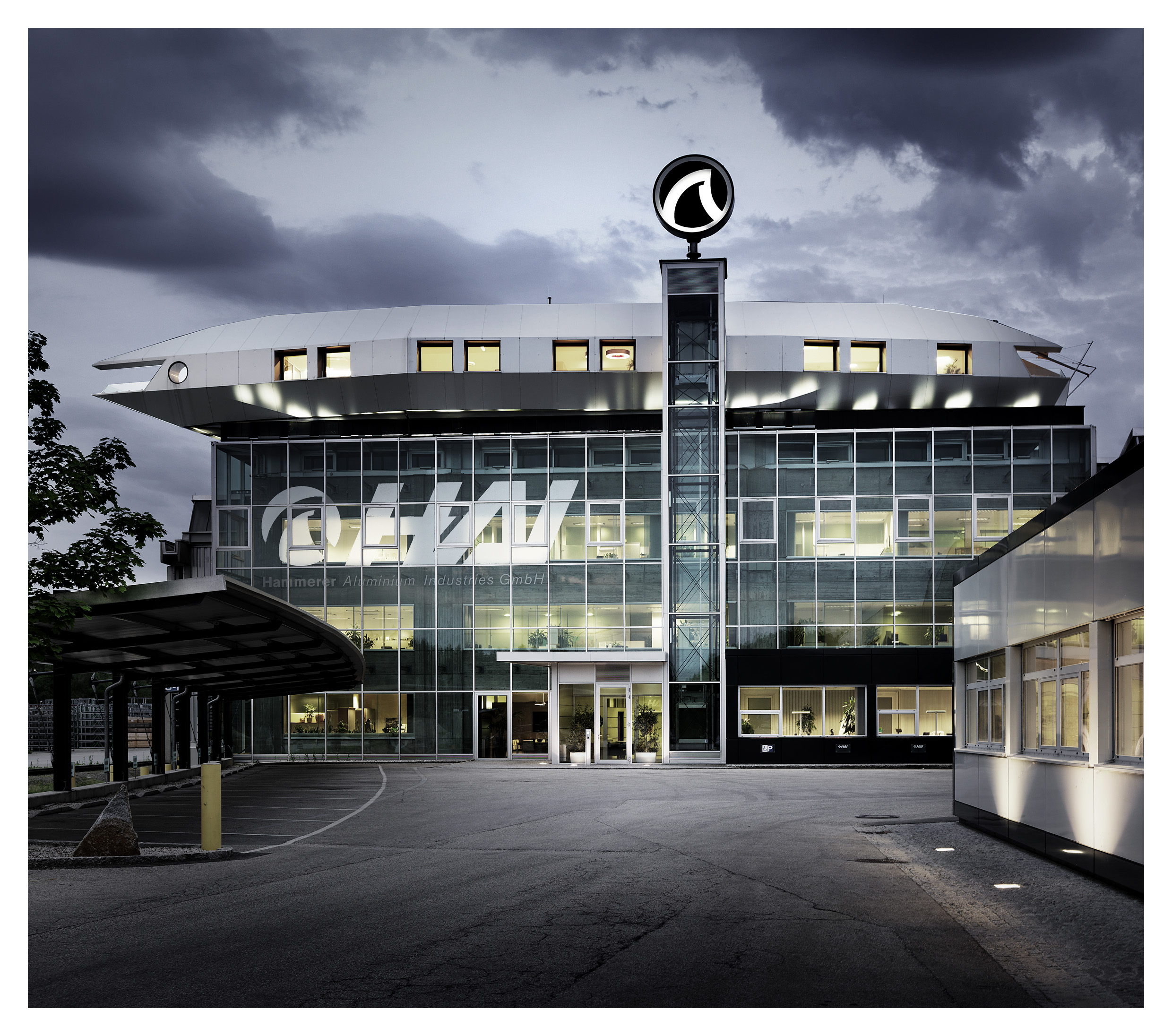 Headquarter in Ranshofen (Österreich)